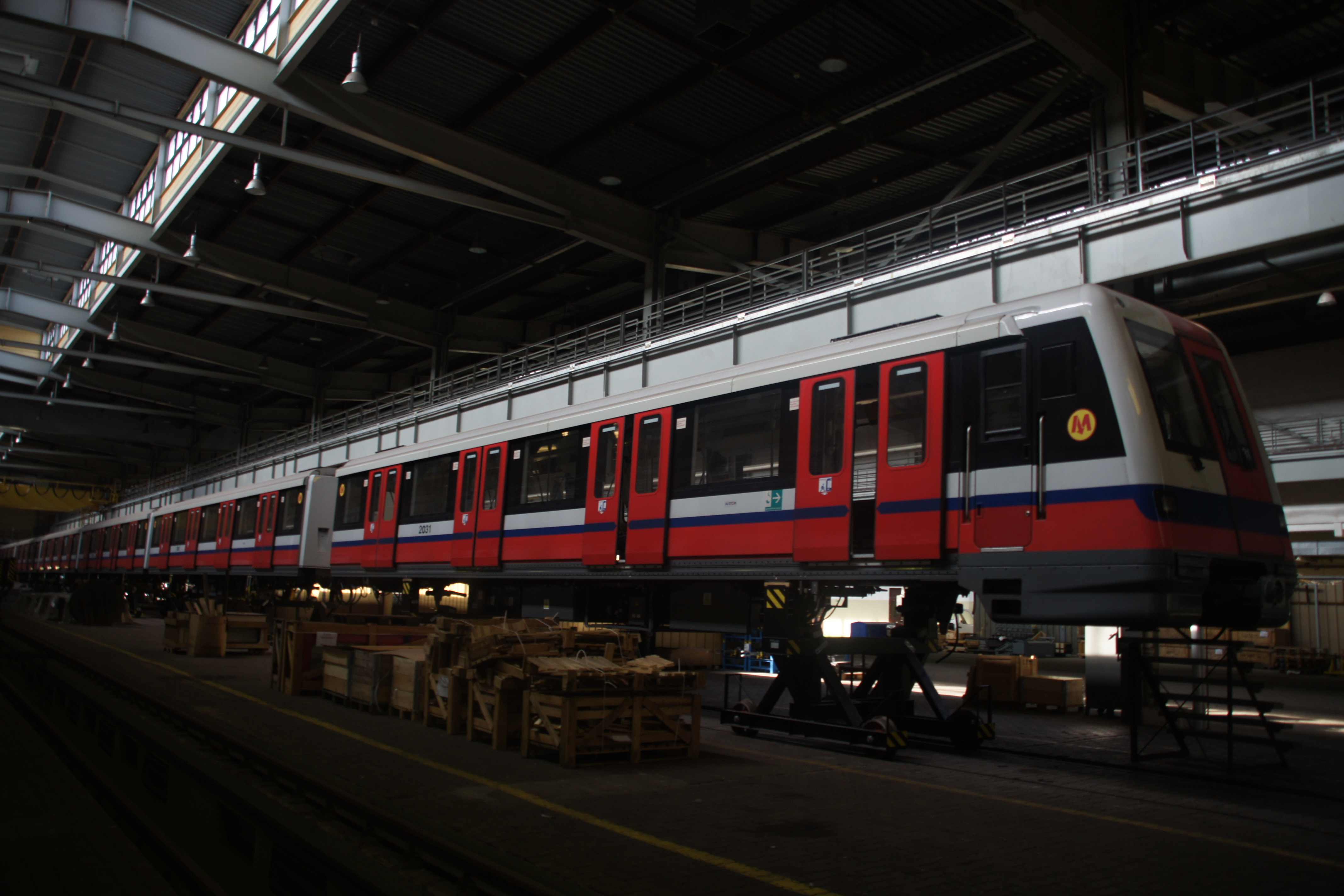 Pociąg Metra typu "Metropolis" w elektrowozowni - Stacja Techniczno-Postojowa Metra na Kabatach